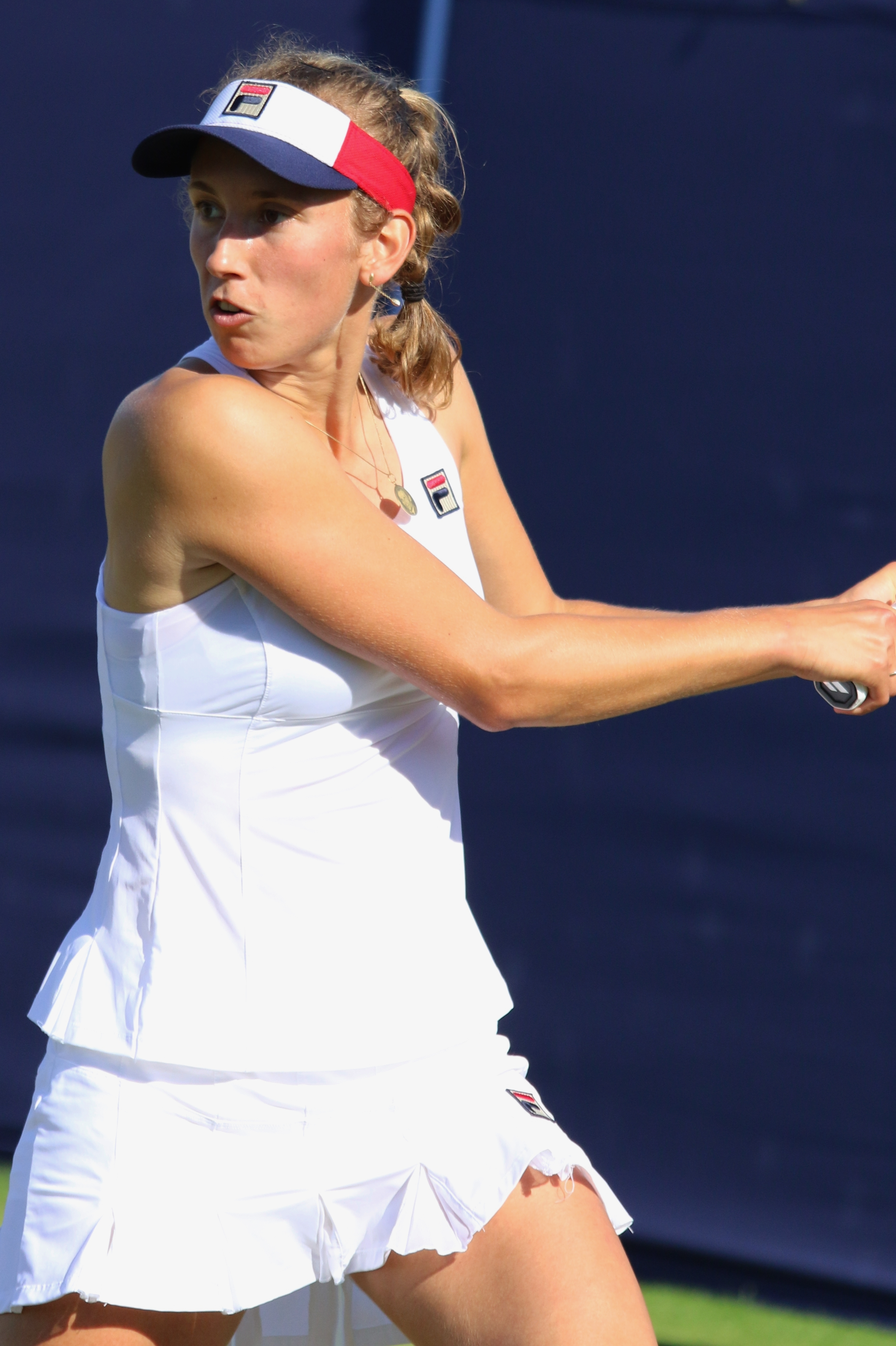 Mertens EBN17 (25)